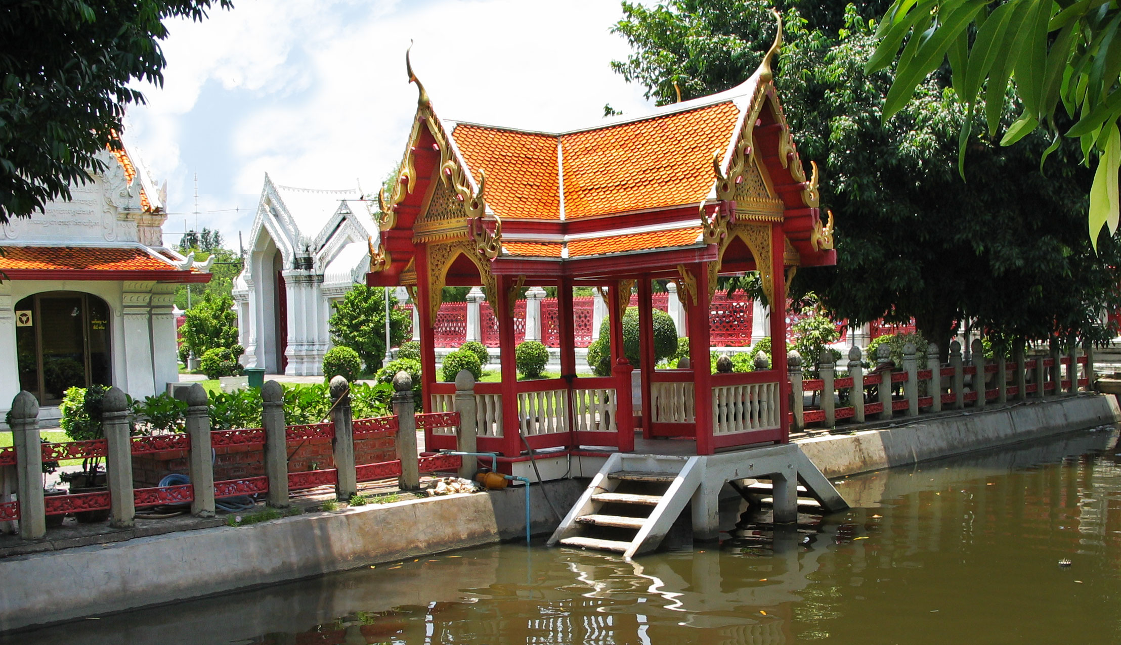 Sala Nam (water pavillon), Wat Benchamabophit, Bangkok, Thailand